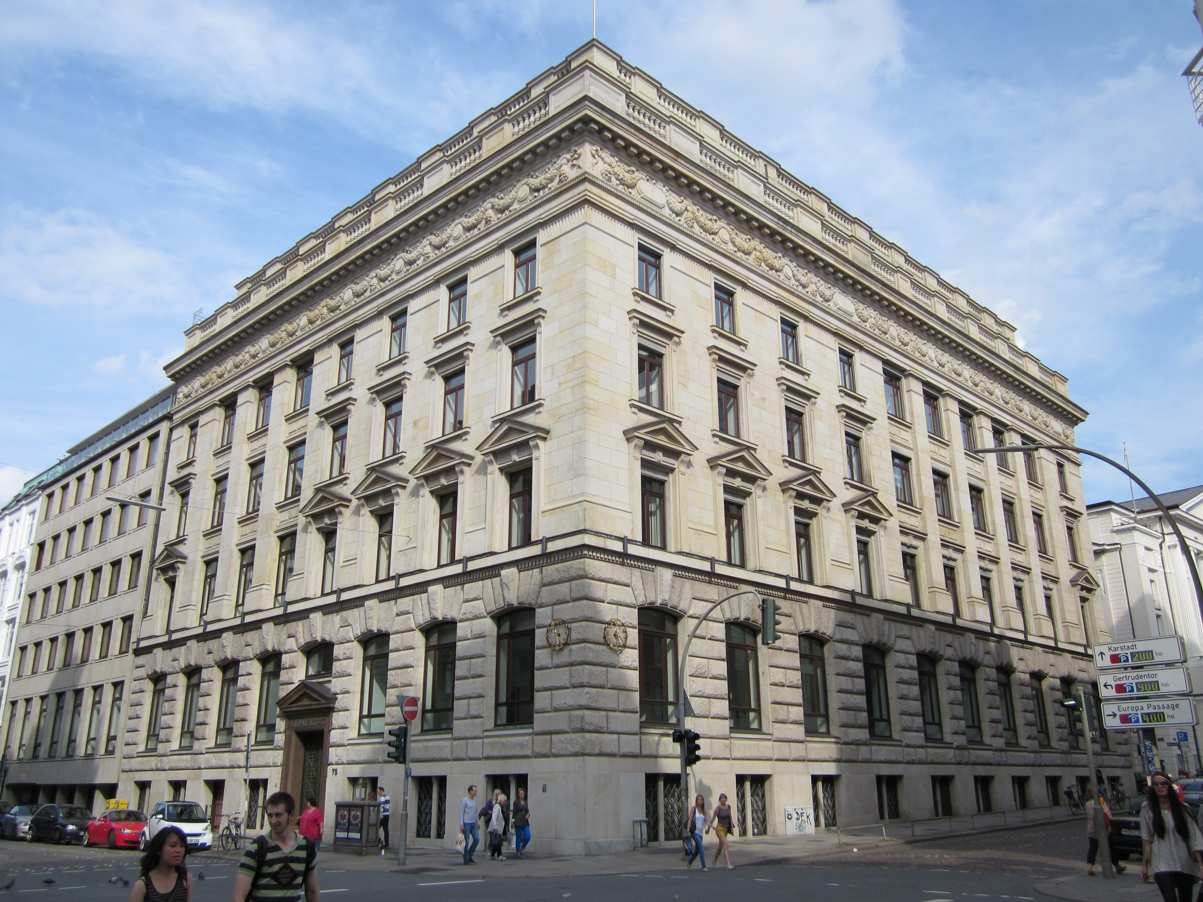 Das in der Ferdinandstraße 75 in Hamburg-Altstadt wurde 1912/13 nach Plänen von Martin Haller im Stil der Neorenaissance errichtet.